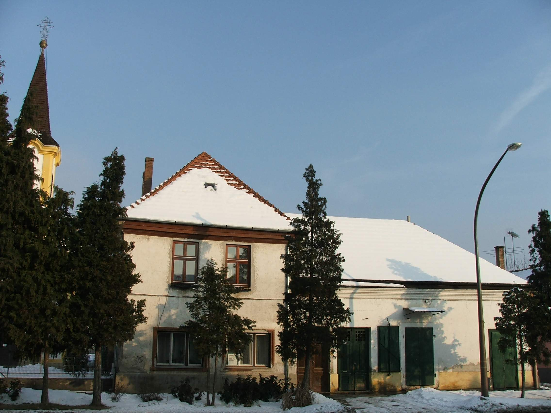 Dóczy-ház (Egykori fogadalmi templom és aggok háza). - Komárom-Esztergom megye, Esztergom, Kossuth Lajos utca 62-62/a